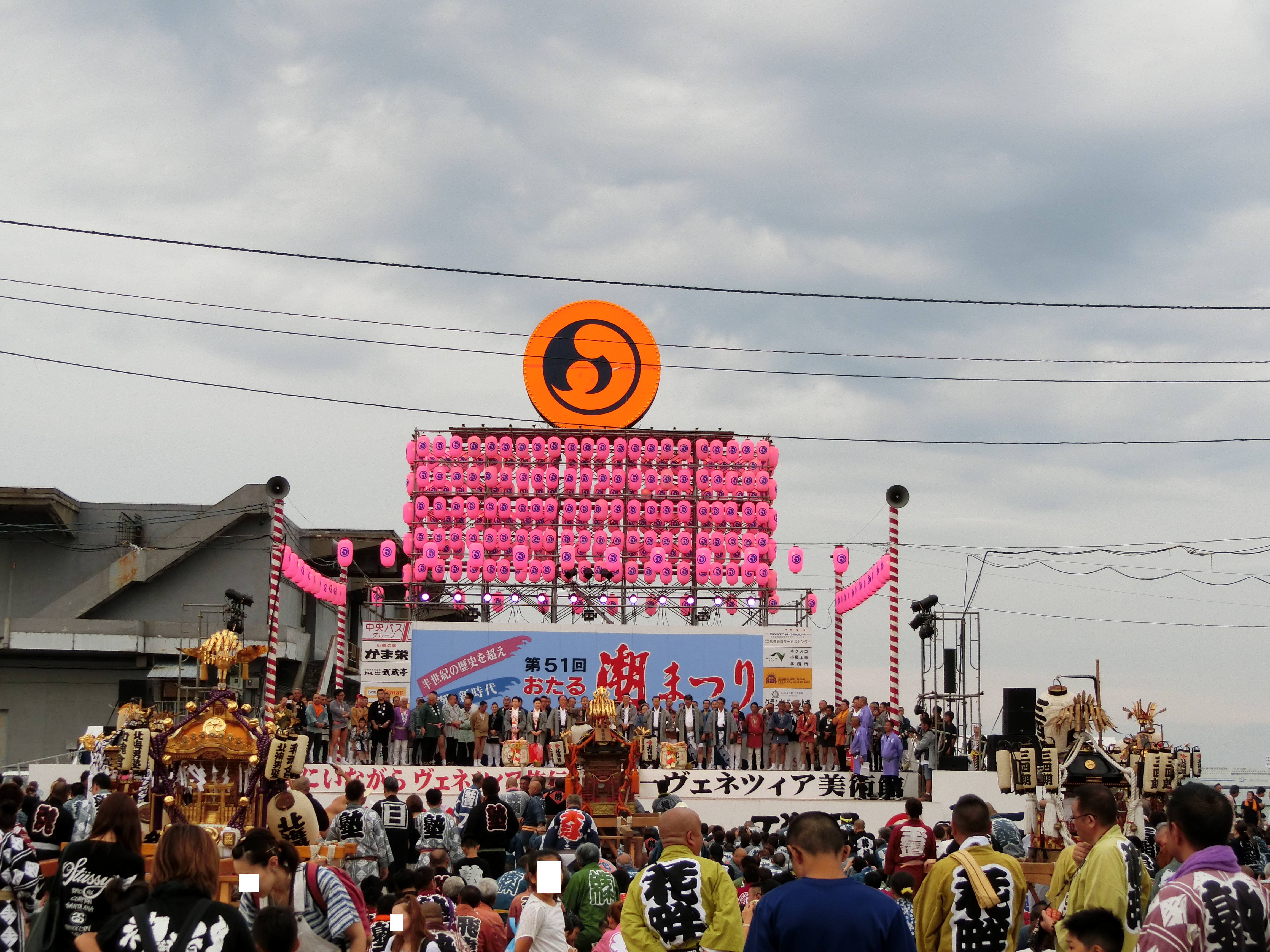 小樽港にあるおたる潮まつりのメイン会場の潮ねりこみの様子